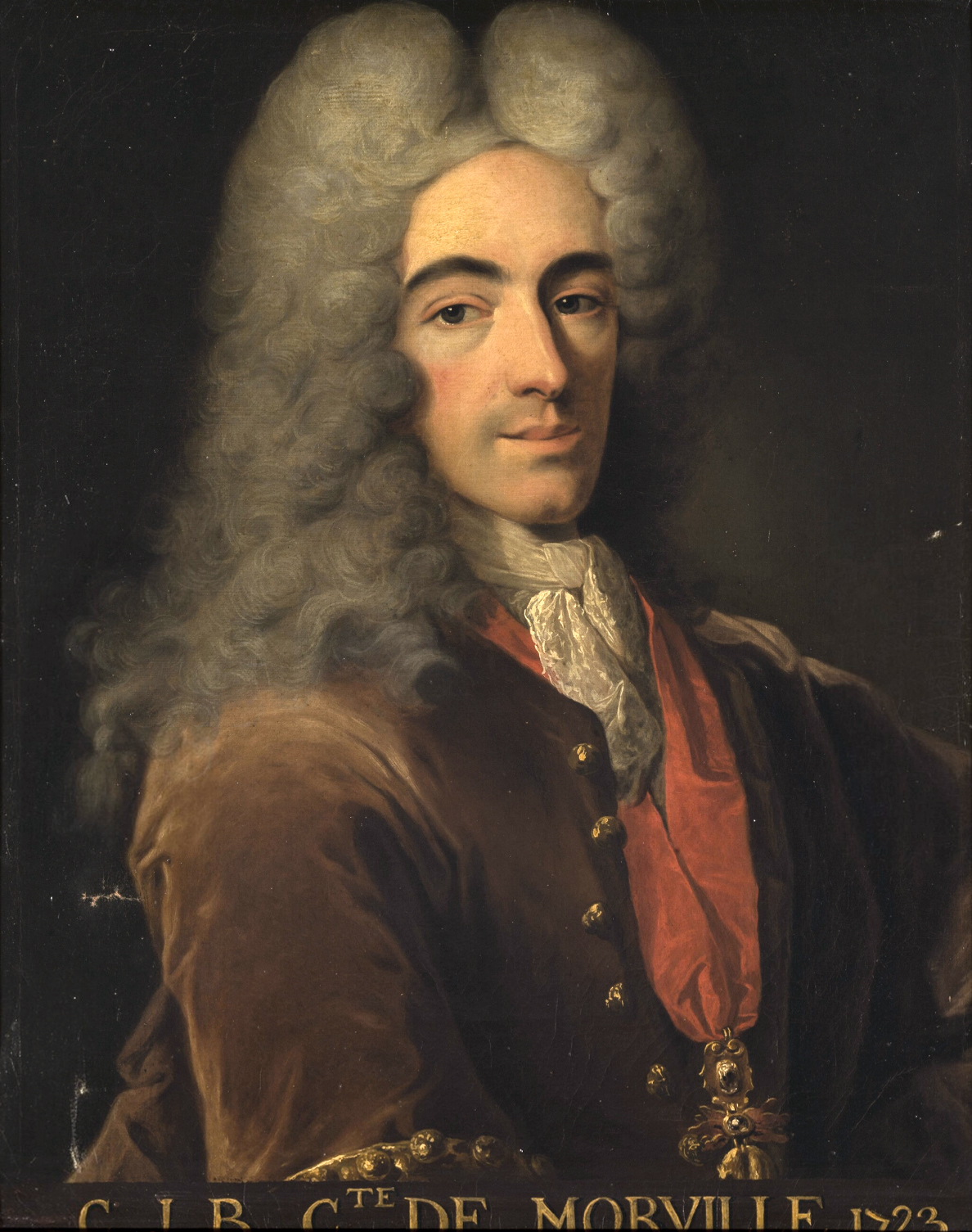 Ministre des Affaires étrangères, il porte l'ordre de la Toison d'Or